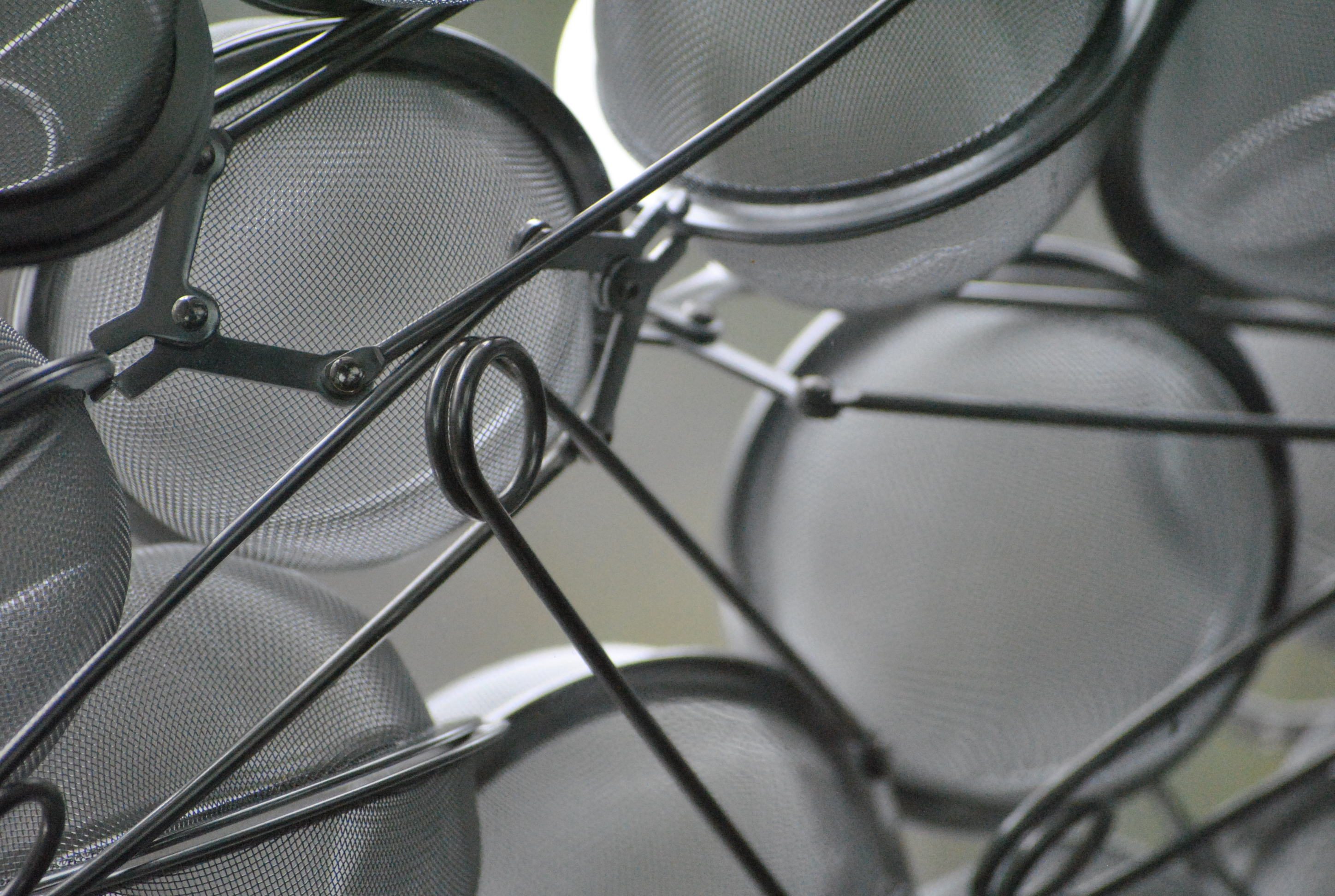 Teesiebe, Nahaufnahme eines Fensters des Christus-Pavillons